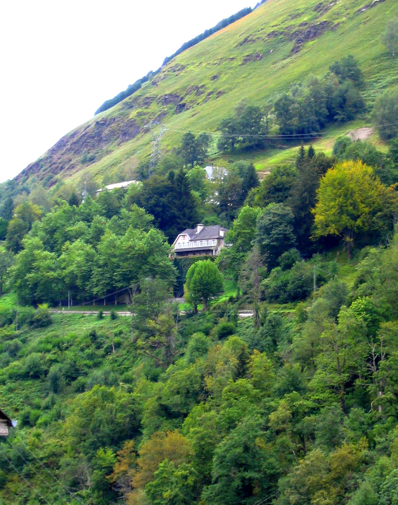 Eaux-Bonnes, Pyrénées Atlantiques, France